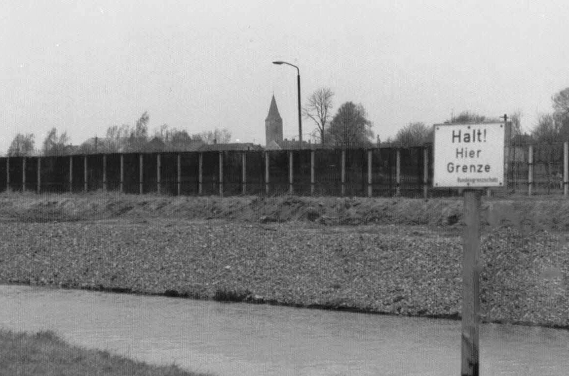 DDR-Grenze vor Oebisfelde, ungefähr von Büstedt aus gesehen.